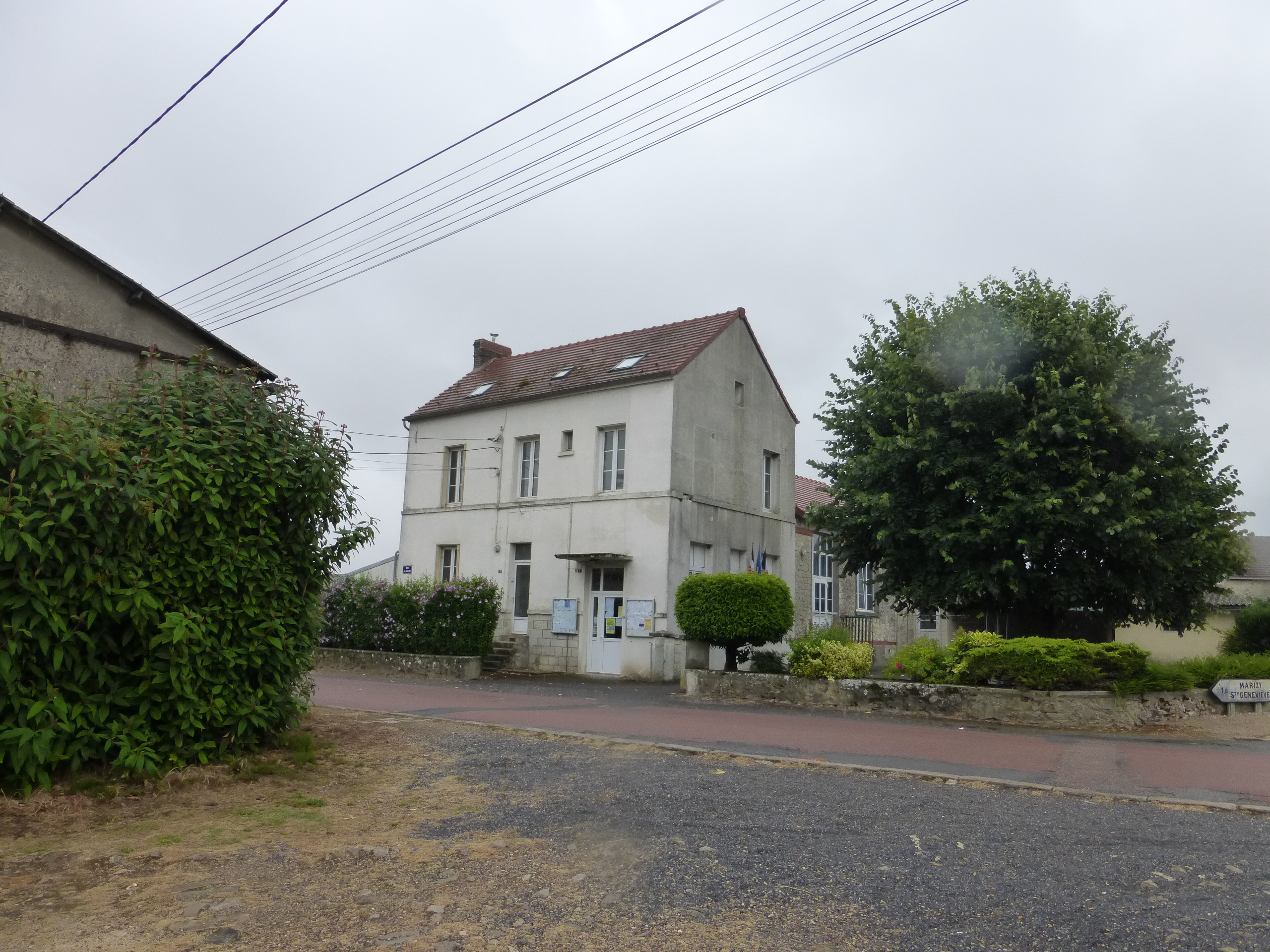 Passy-en-Valois - Mairie